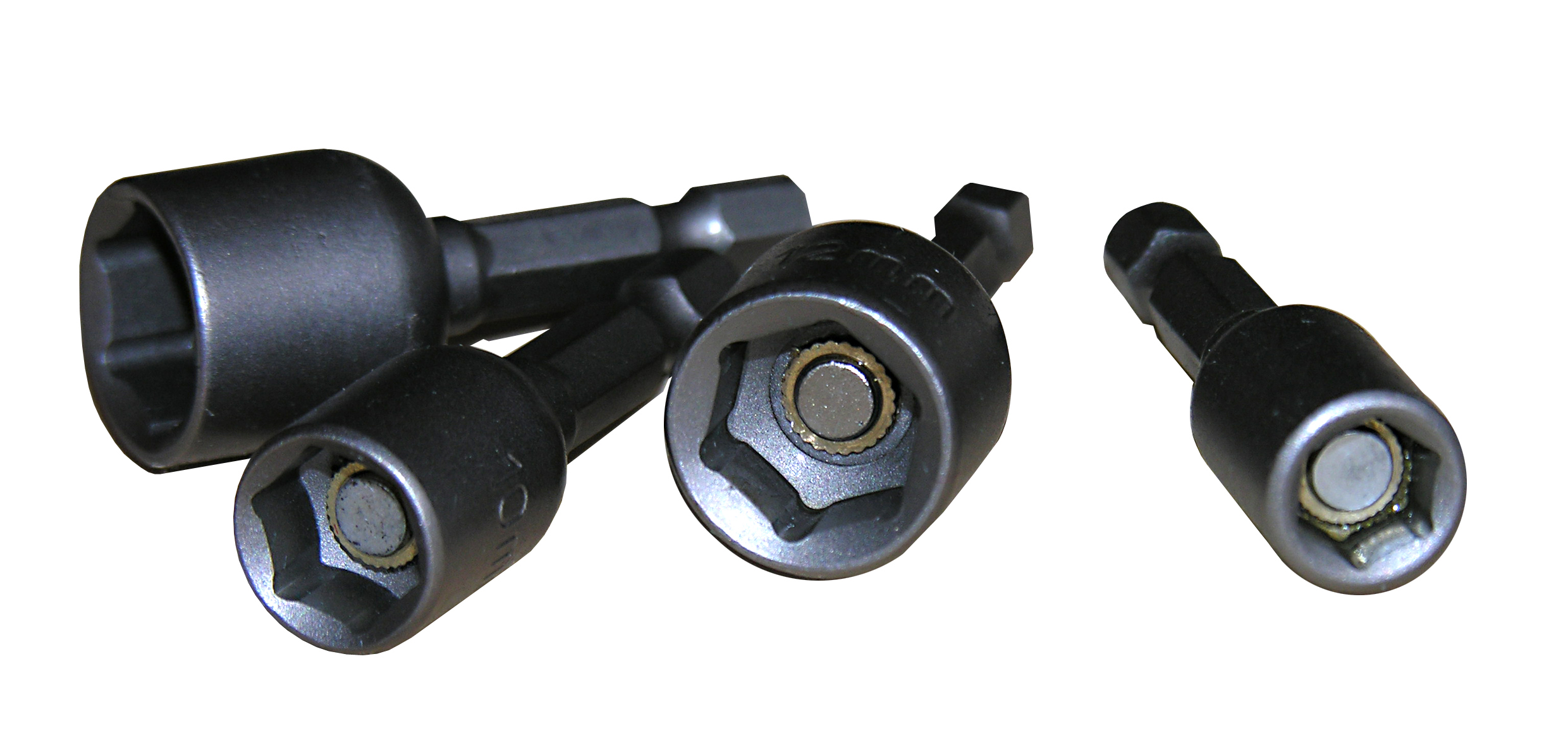 Торцевые головки с магнитом и шестигранным хвостовиком с широкой канавкой для пружинной фиксации по ISO 1173 E6.3.